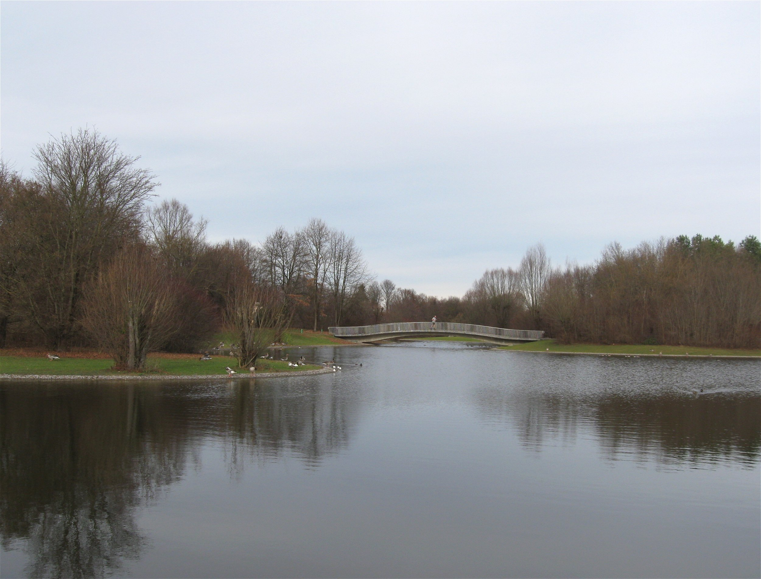 Ostpark in München